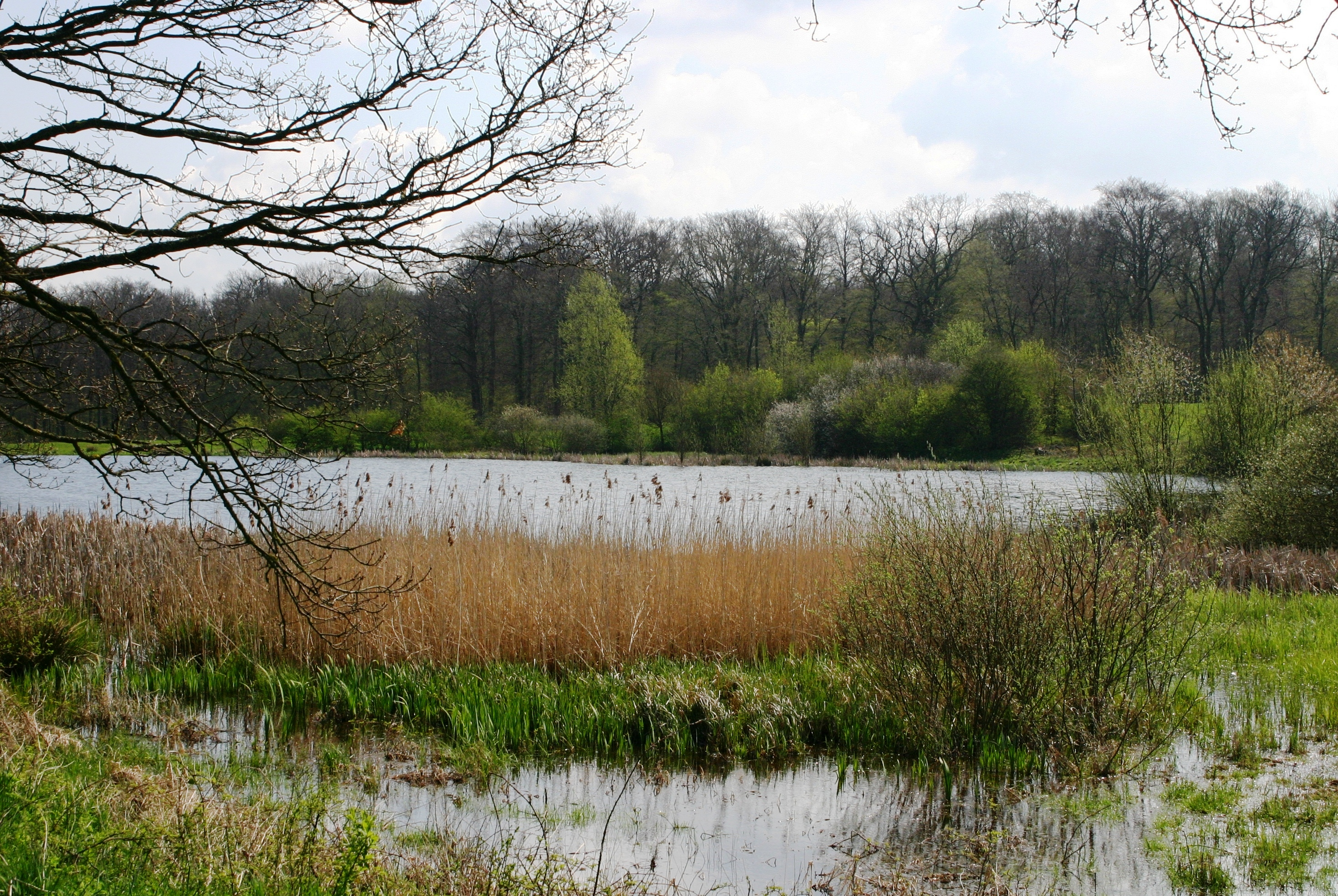 Um Nuechtbann 2008. Kategorie:Häff a Lieu-diten zu Lëtzebuerg Kategorie:Gemeng Kënzeg Kategorie:Fréier Uertschaften zu Lëtzebuerg